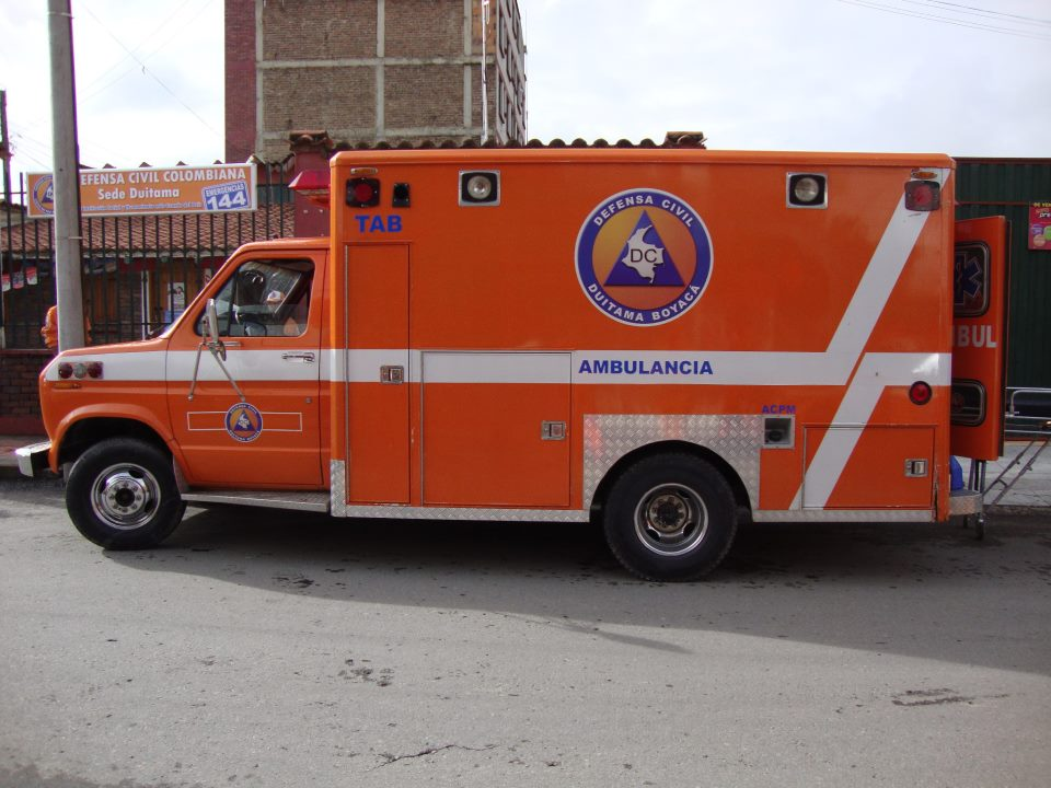 la Unidad de rescate norteamericana implementada hace arios años, para apoyo de la Defensa Civil Duitama